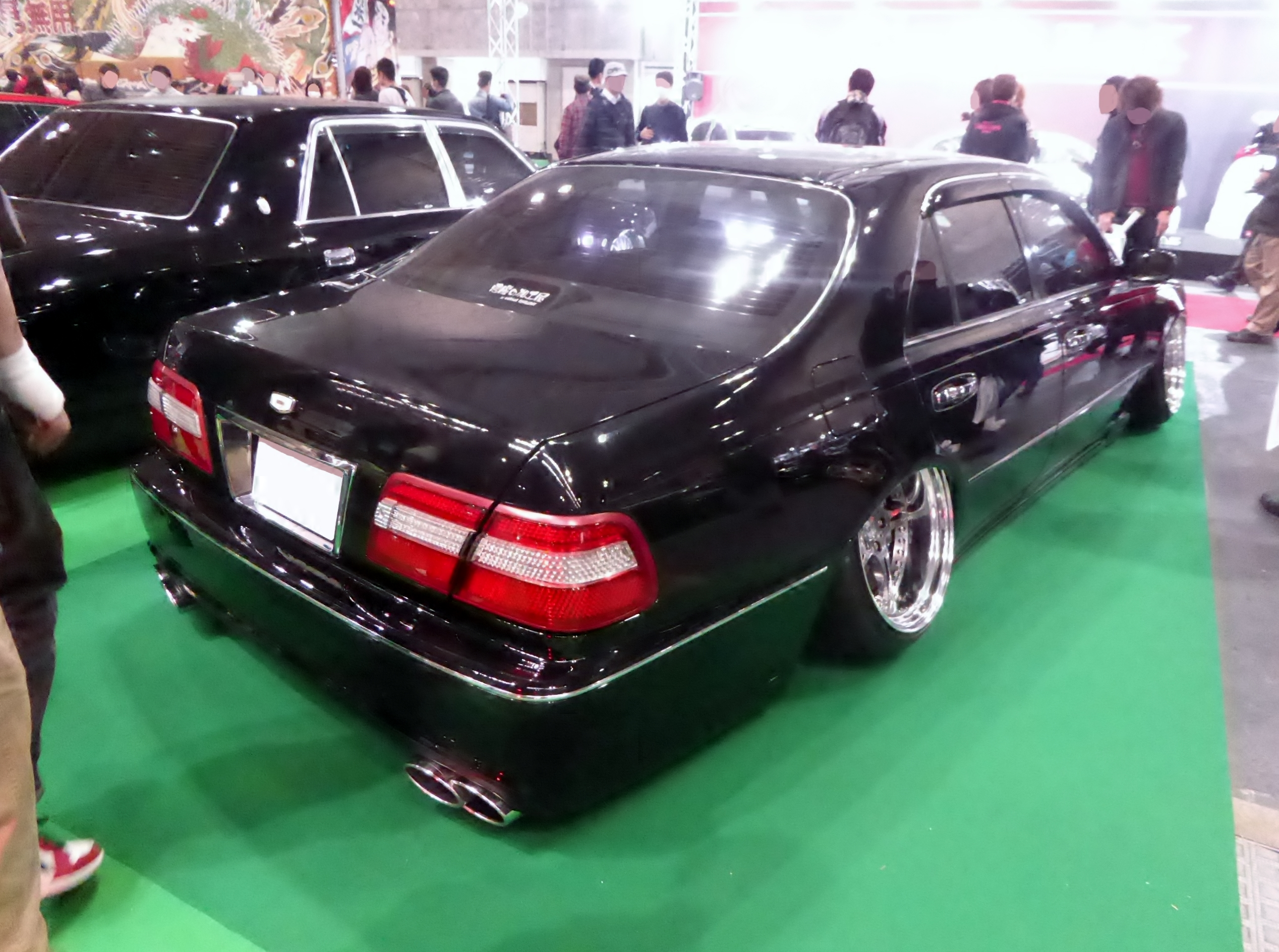 大阪オートメッセ2016において車高短シーマを撮影。